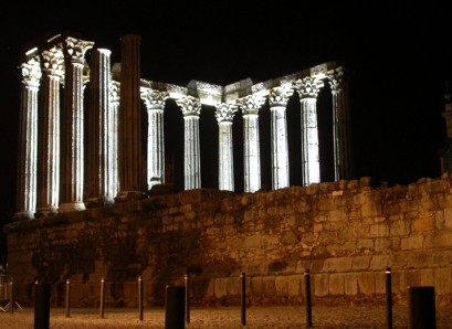 Der Diana-Tempel in Evora (Portugal)